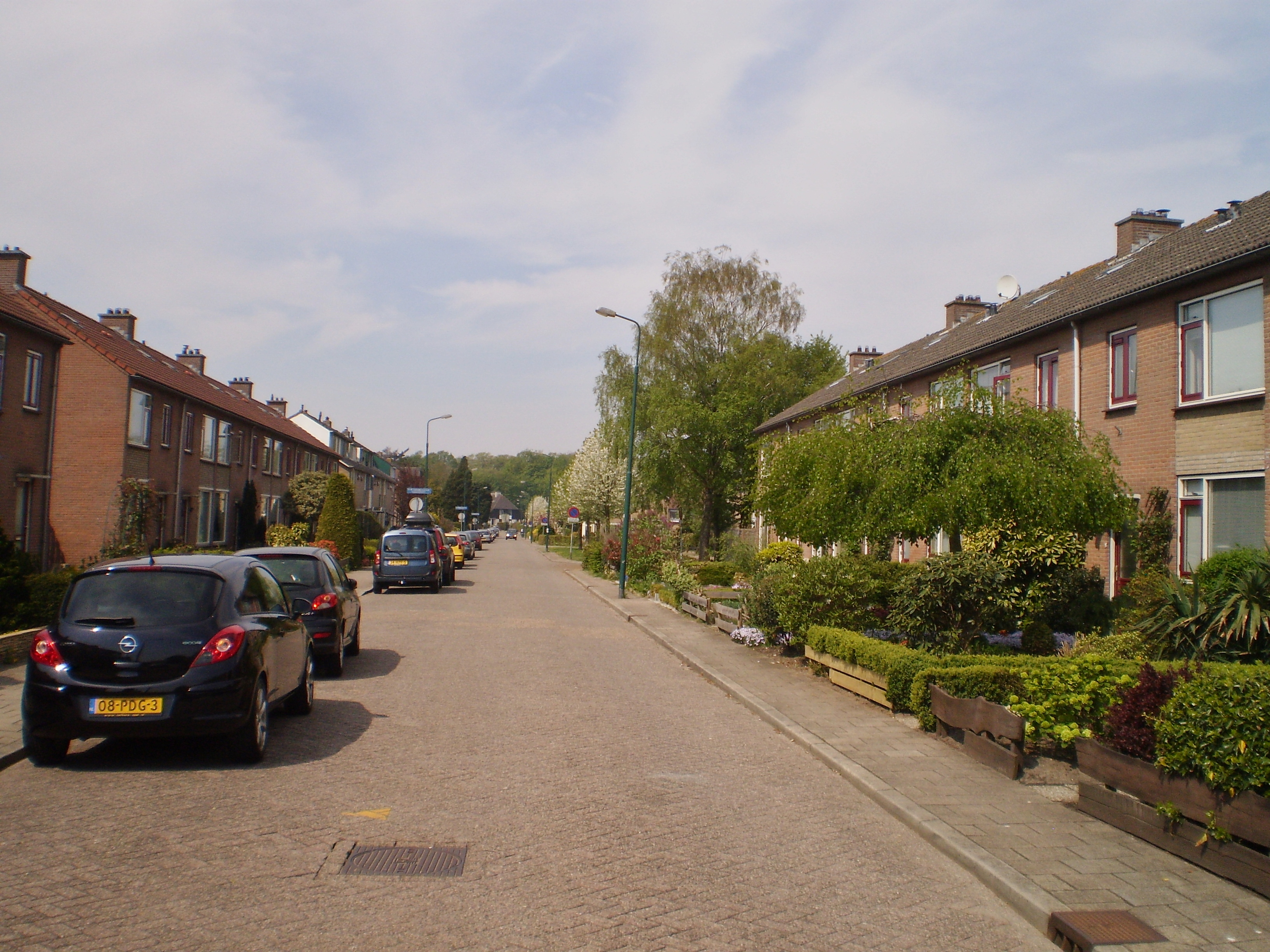 Richting zuidwest